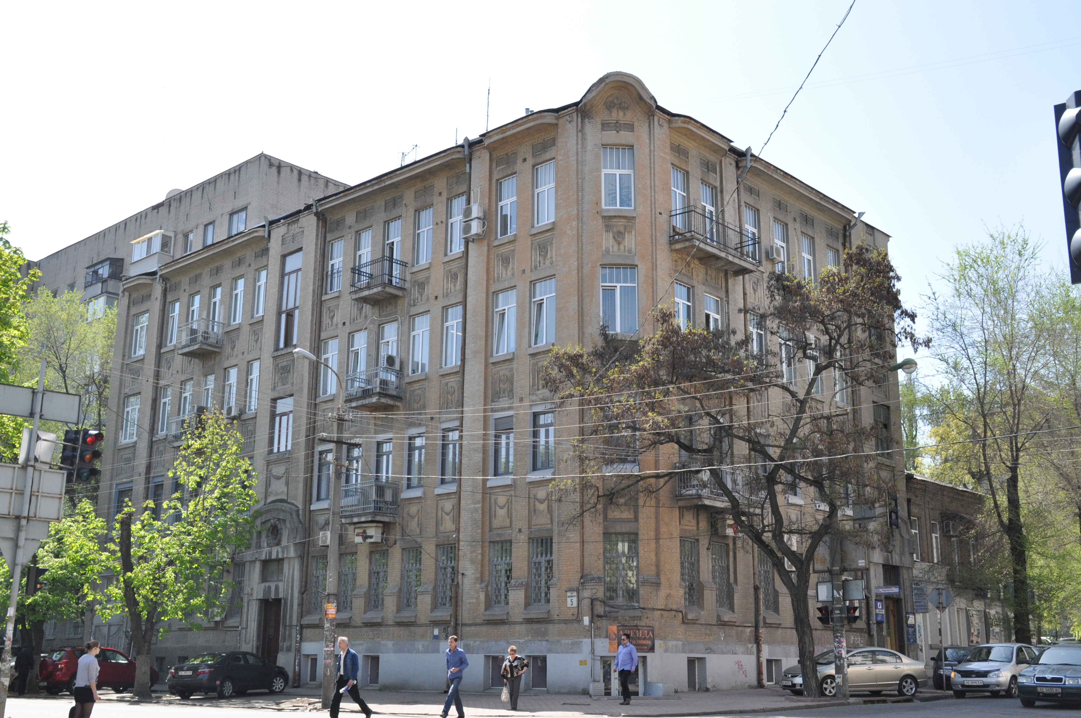 Доходний будинок Губергріца, Дніпро, вул. Старокозацька (Комсомольська), 5